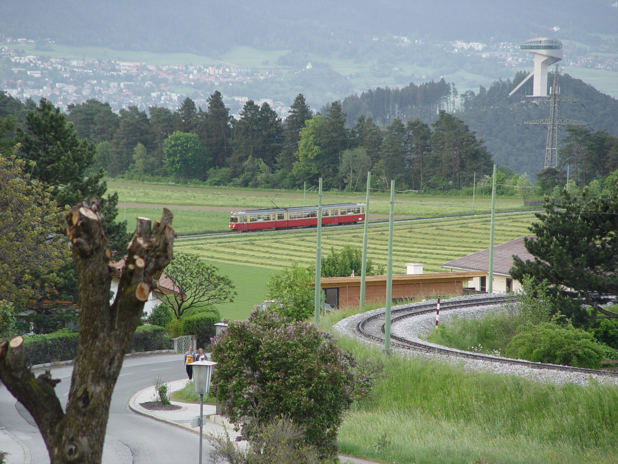 Blick vom Bahnhof Mutters auf Innsbruck mit Stubaitalbahn im Vordergrund